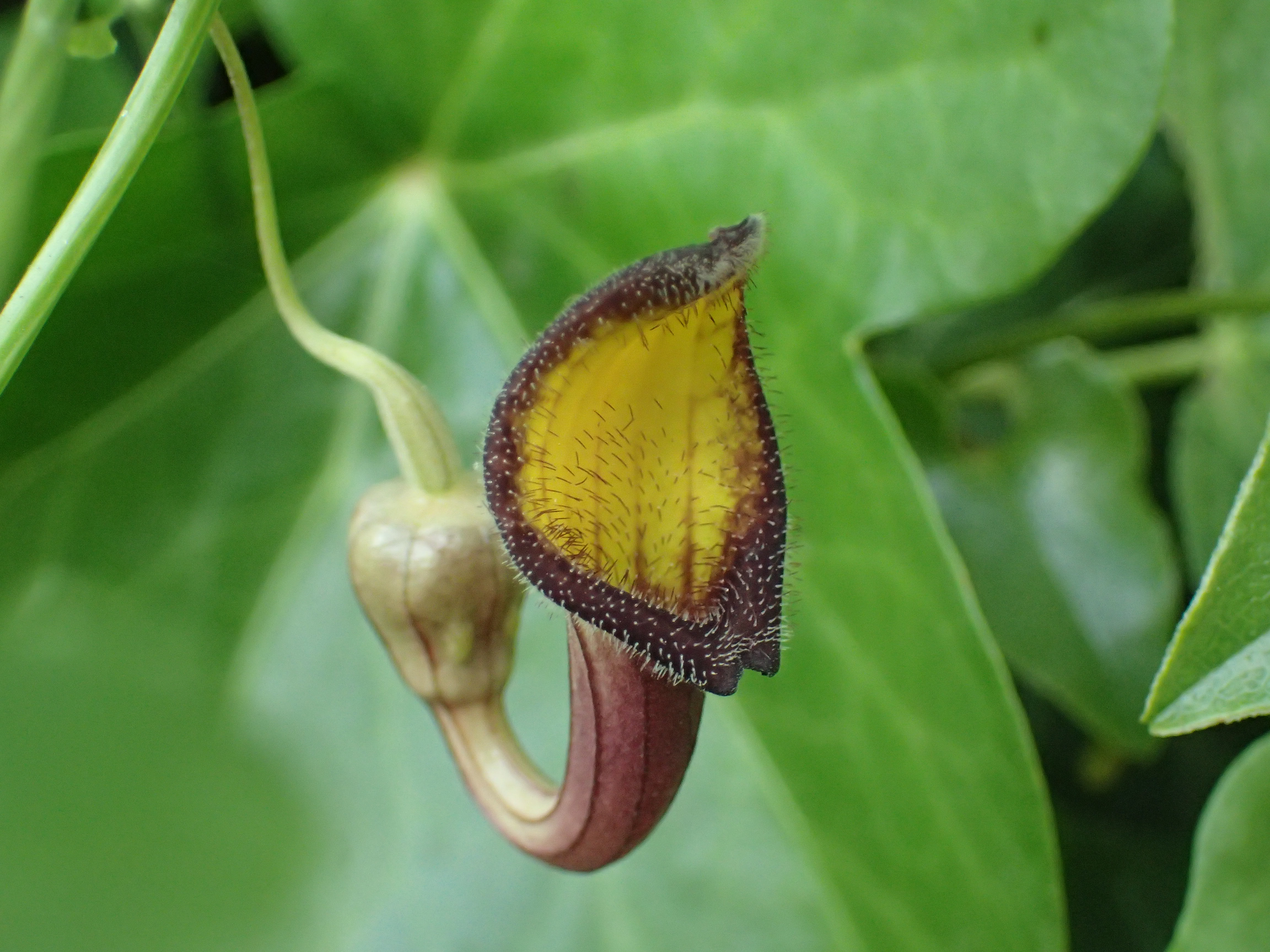 Lockerer Kiefernwald bei Olympia, Griechenland